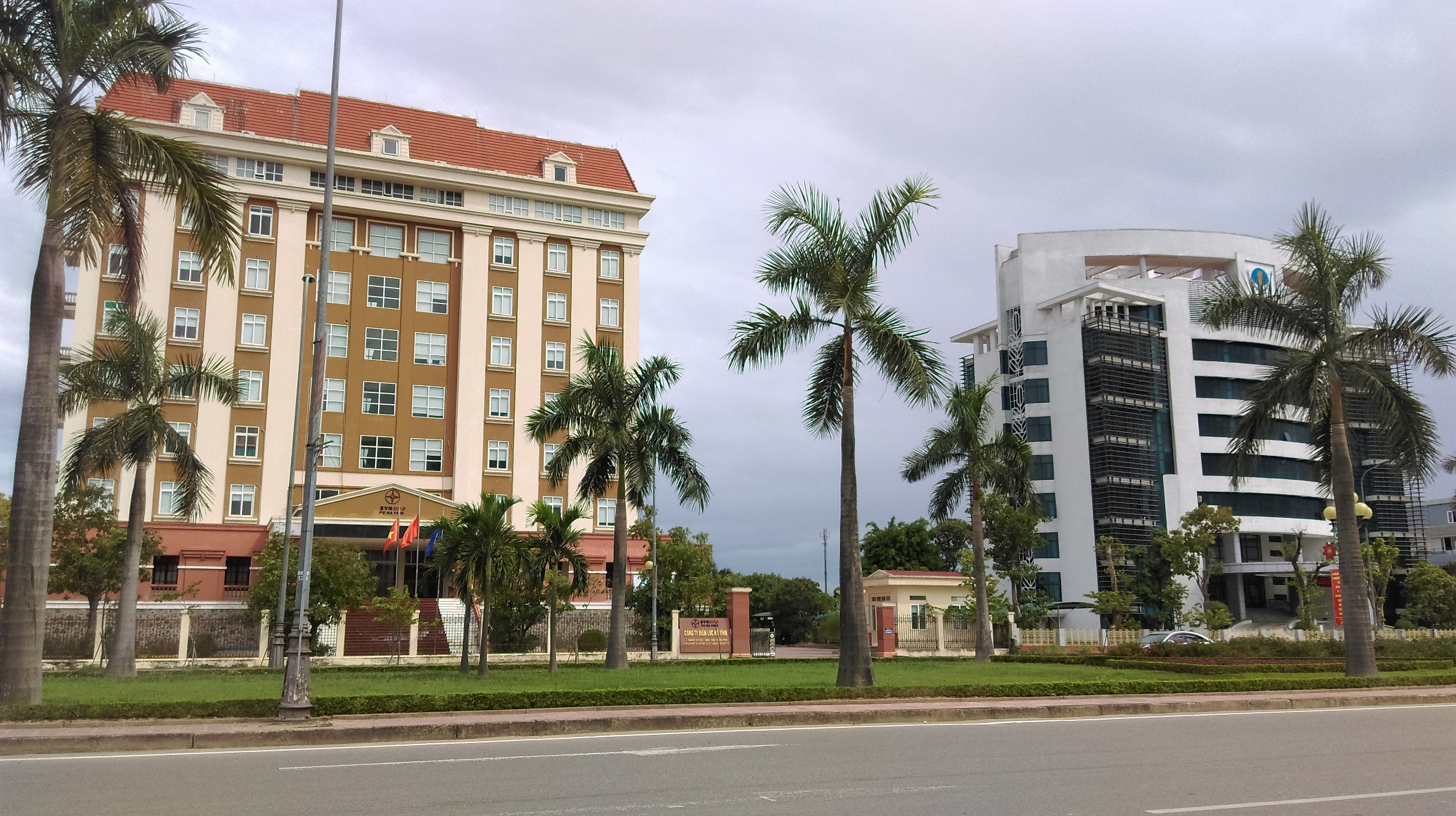 Điện lực (trái) và Sở NN&PTNT Hà Tĩnh